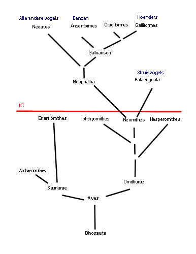 eigen tekening stamboom vogels